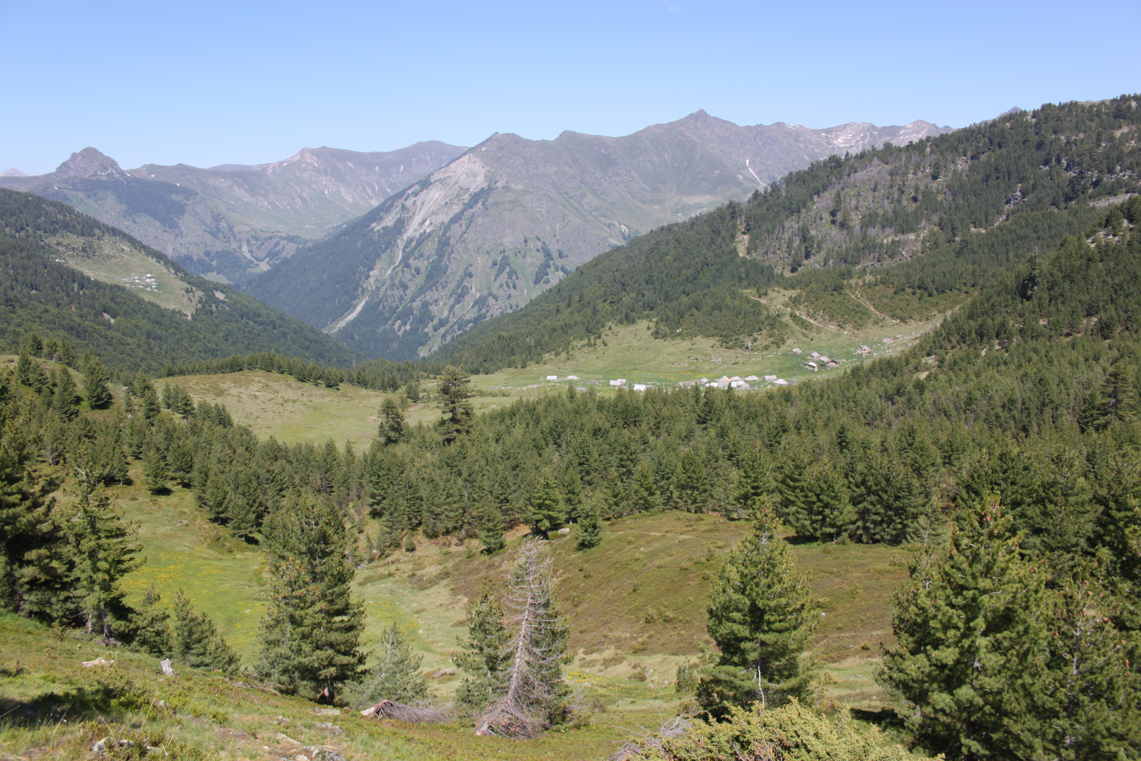 Bjeshkët e Torkuzit ndodhen në rrethin e Tropojës. Në stinën e verës banorët dalin në stane për të veruar dhe mbajtur bagëtitë në kullotat alpine.